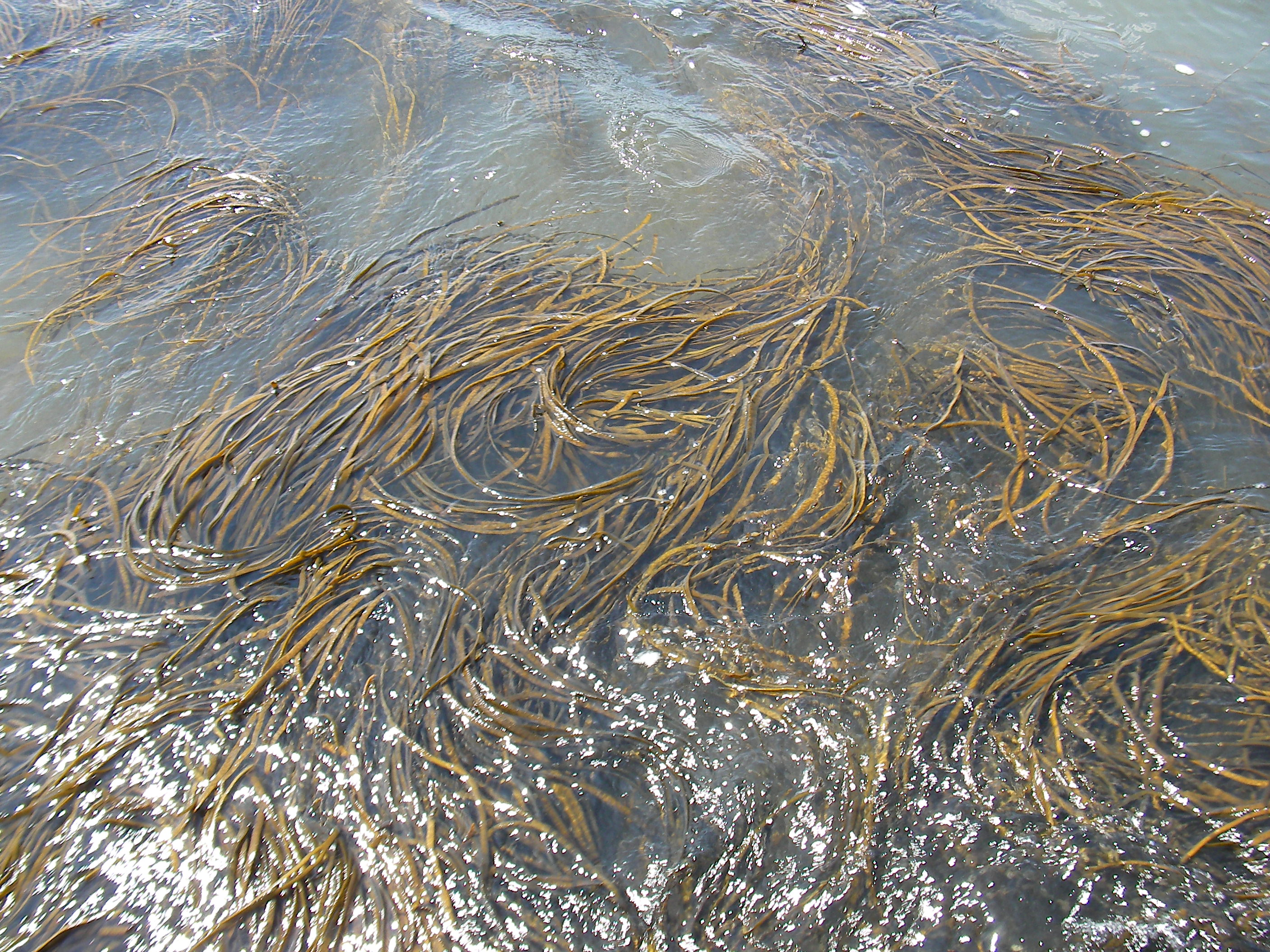 Correolas (himanthalia elongata) nunha ría galega.